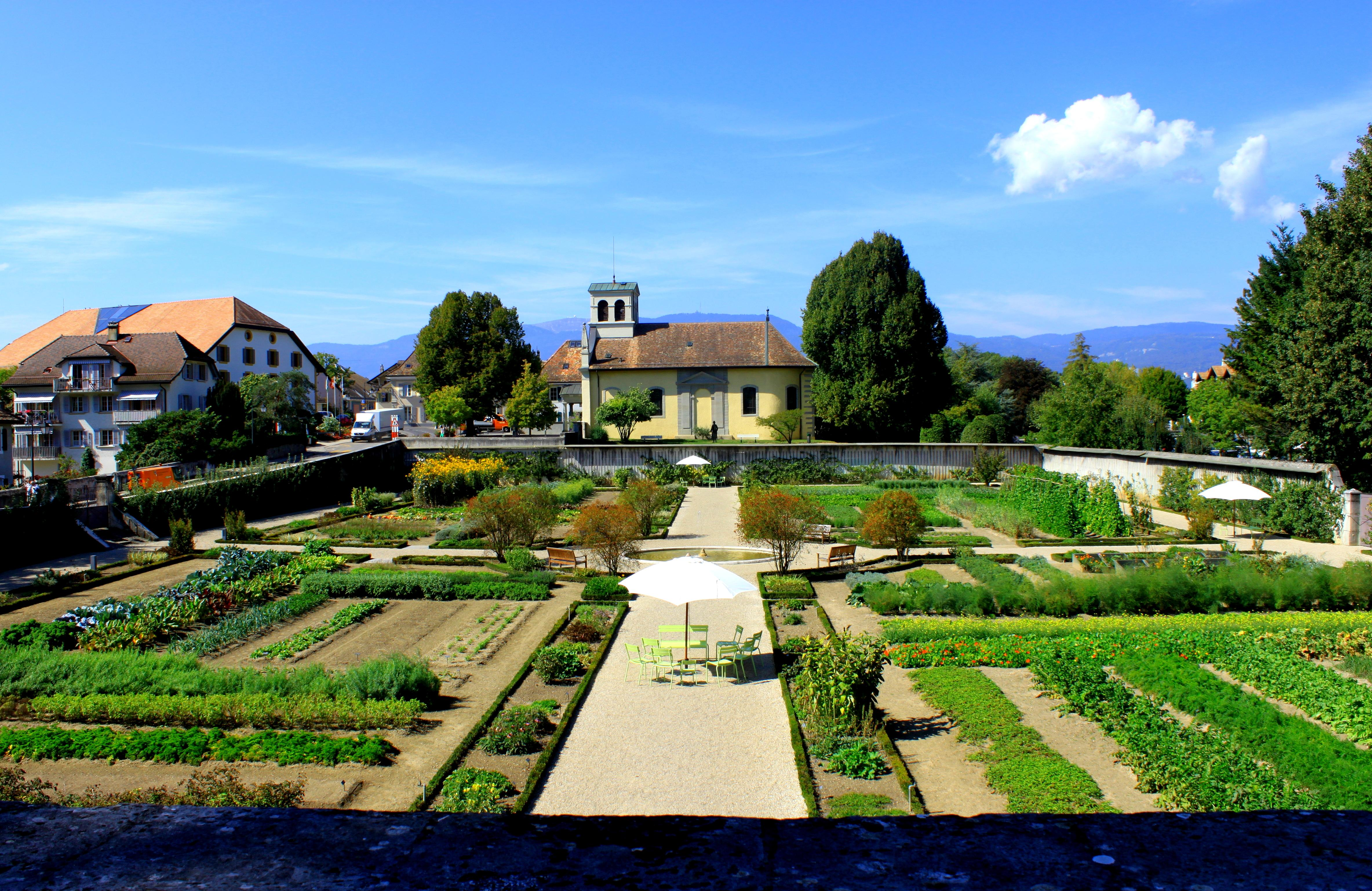 Suisse, canton de Vaud, Château de Prangins.